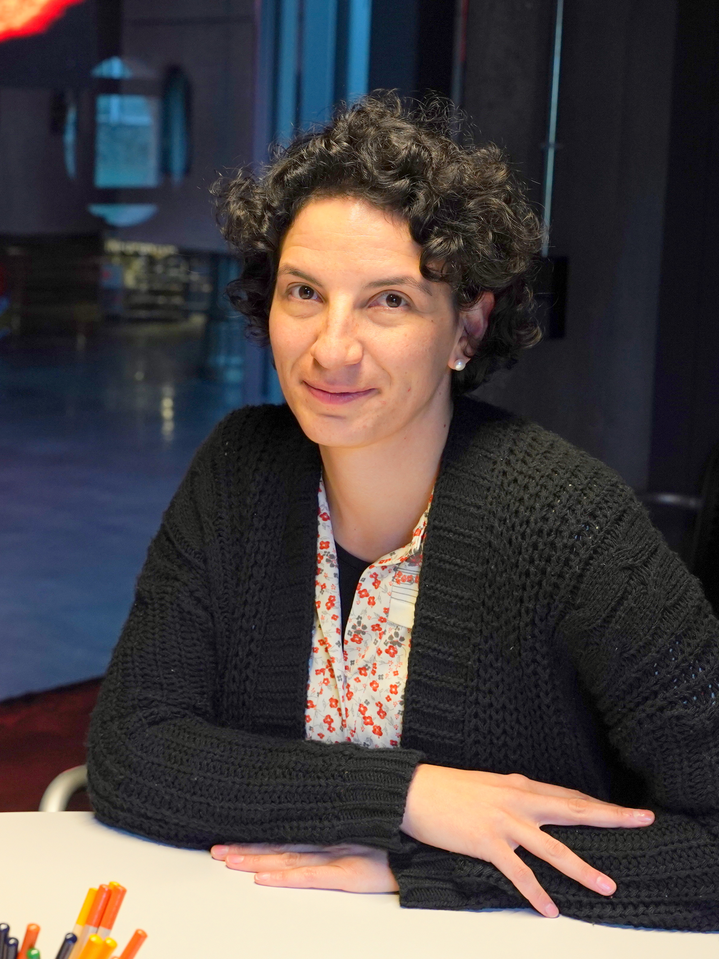 "El lenguaje del futuro tiene que ser uno que se escriba intergeneracionalmente, que sea transversal, que tenga una perspectiva de género clara y que trate de ponerle palabras a las cosas que todavía no las tienen", indica la escritora mexicana